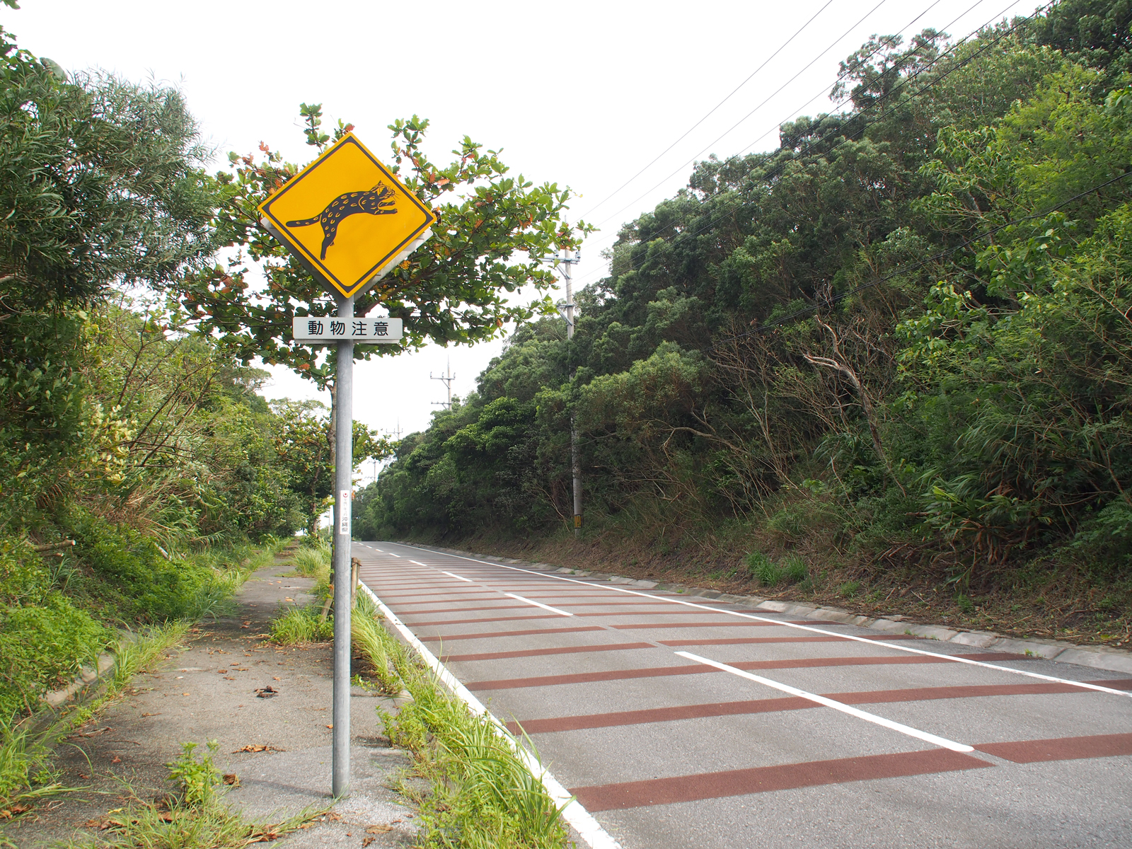 沖縄県道215号の動物注意の標識とゼブラゾーン（沖縄県八重山郡竹富町西表島）